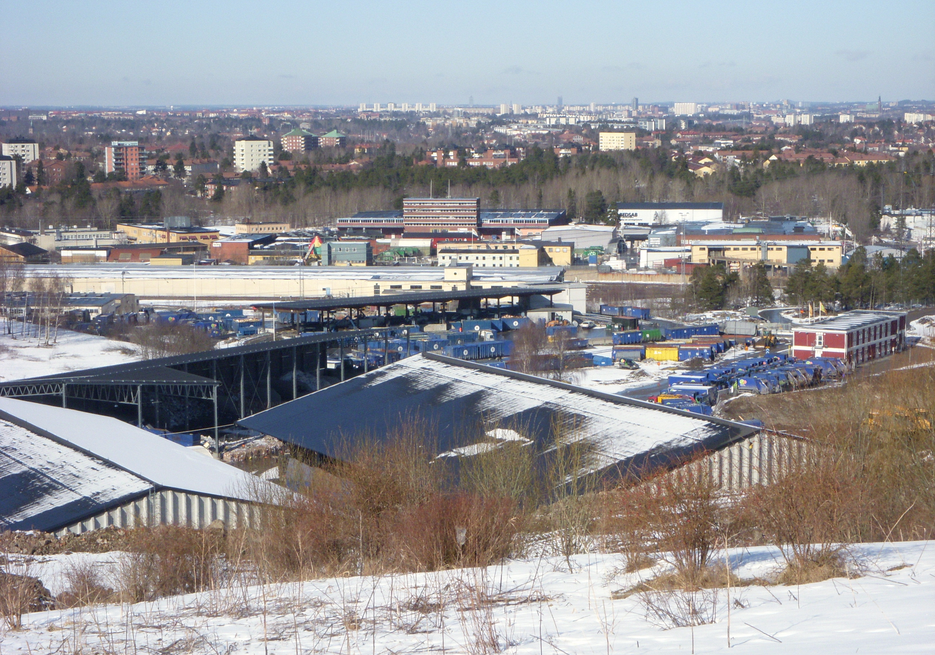 Högdalens industriområde sett från Högdalstoppen